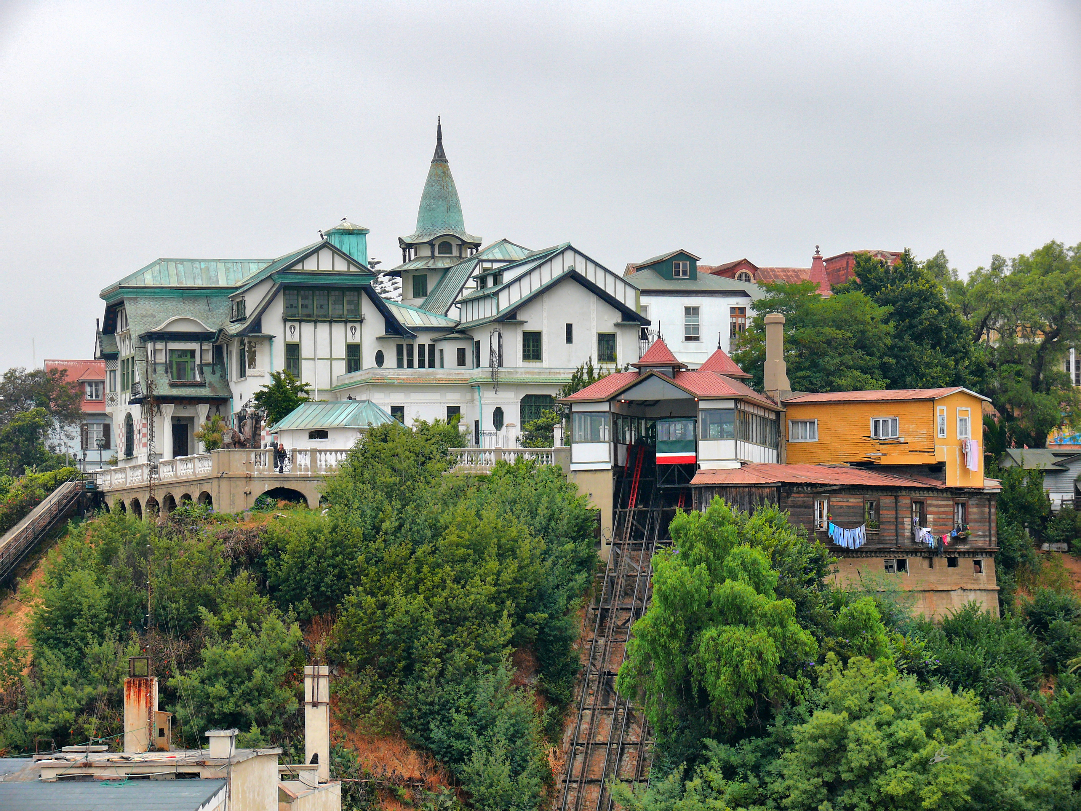 Vista del Palacio Baburizza y del Ascensor El Peral This is a photo of a national monument in Chile: 767